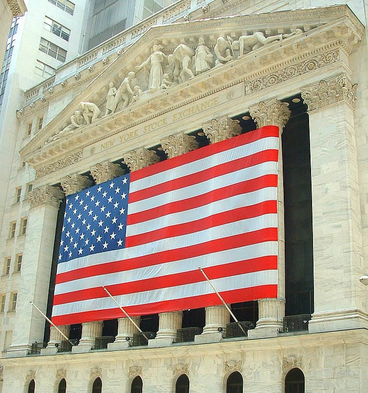 NYSE